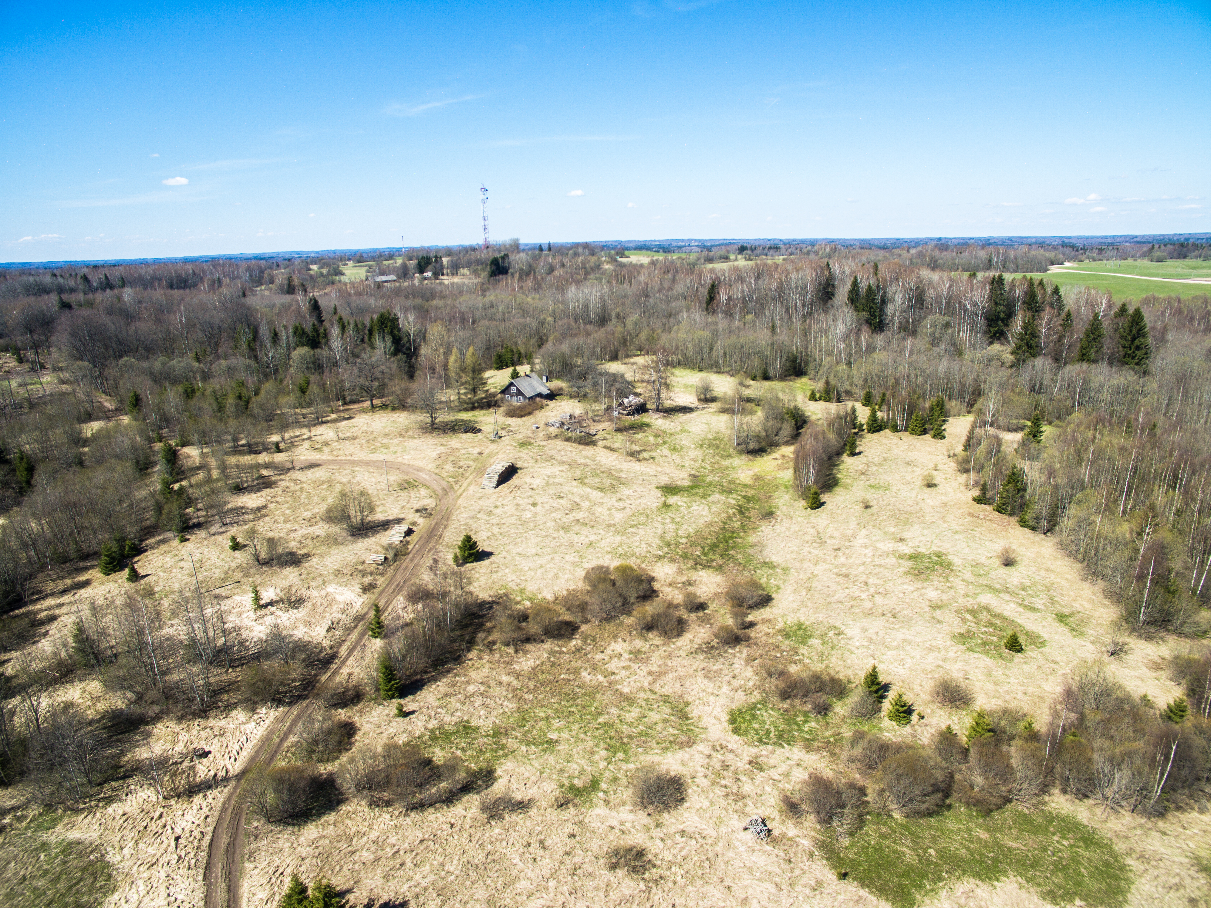 celiņš uz māju, skats uz elku kalna pusi